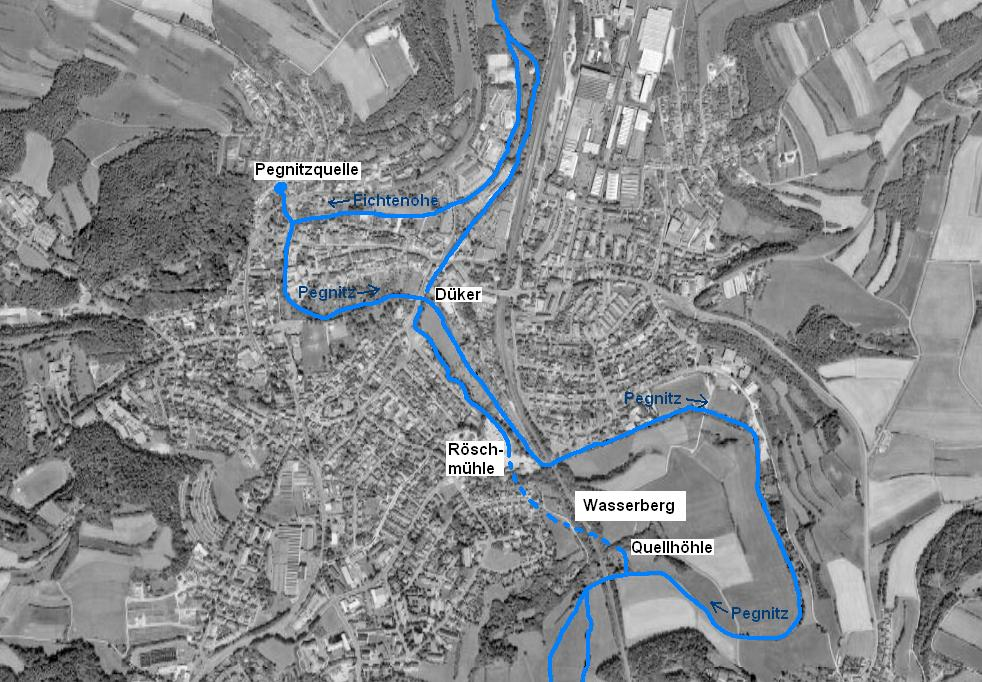 Flusssystem der Pegnitz und Fichtenohe in Pegnitz